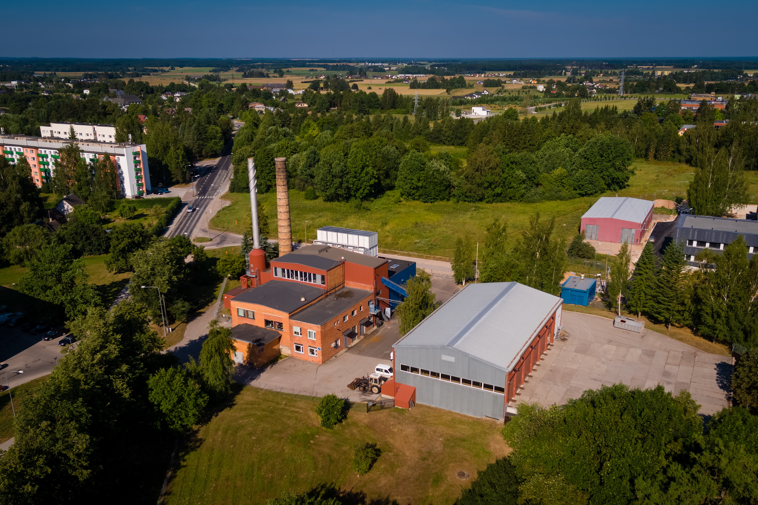 Aardla Külmajaam